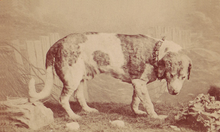 Der ausgestopfte Rettungshund Barry vor der Restaurierung 1923 (Bildpostkarte)